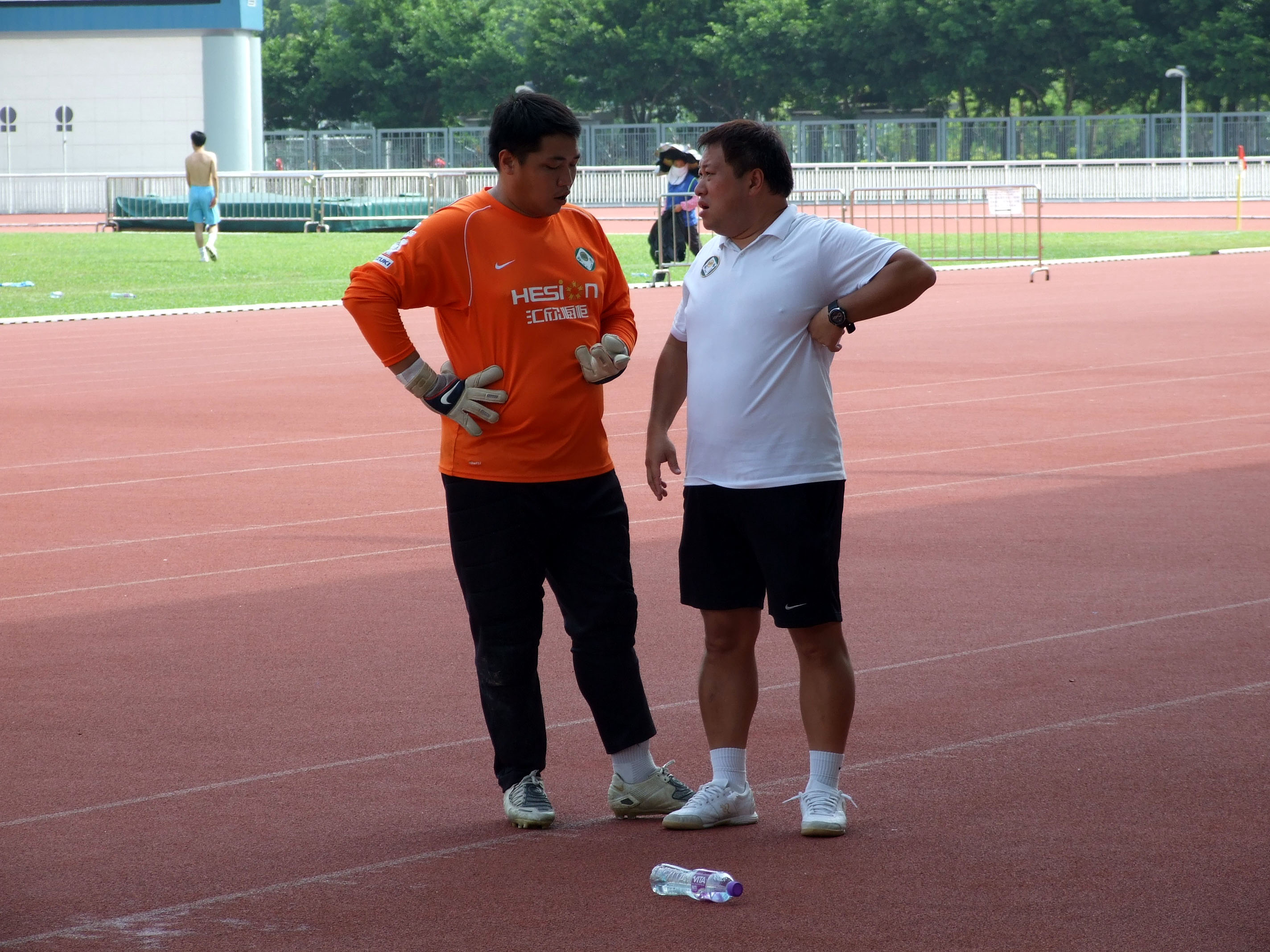 中文（香港）: 愉園體育會鄺曉明及張偉康